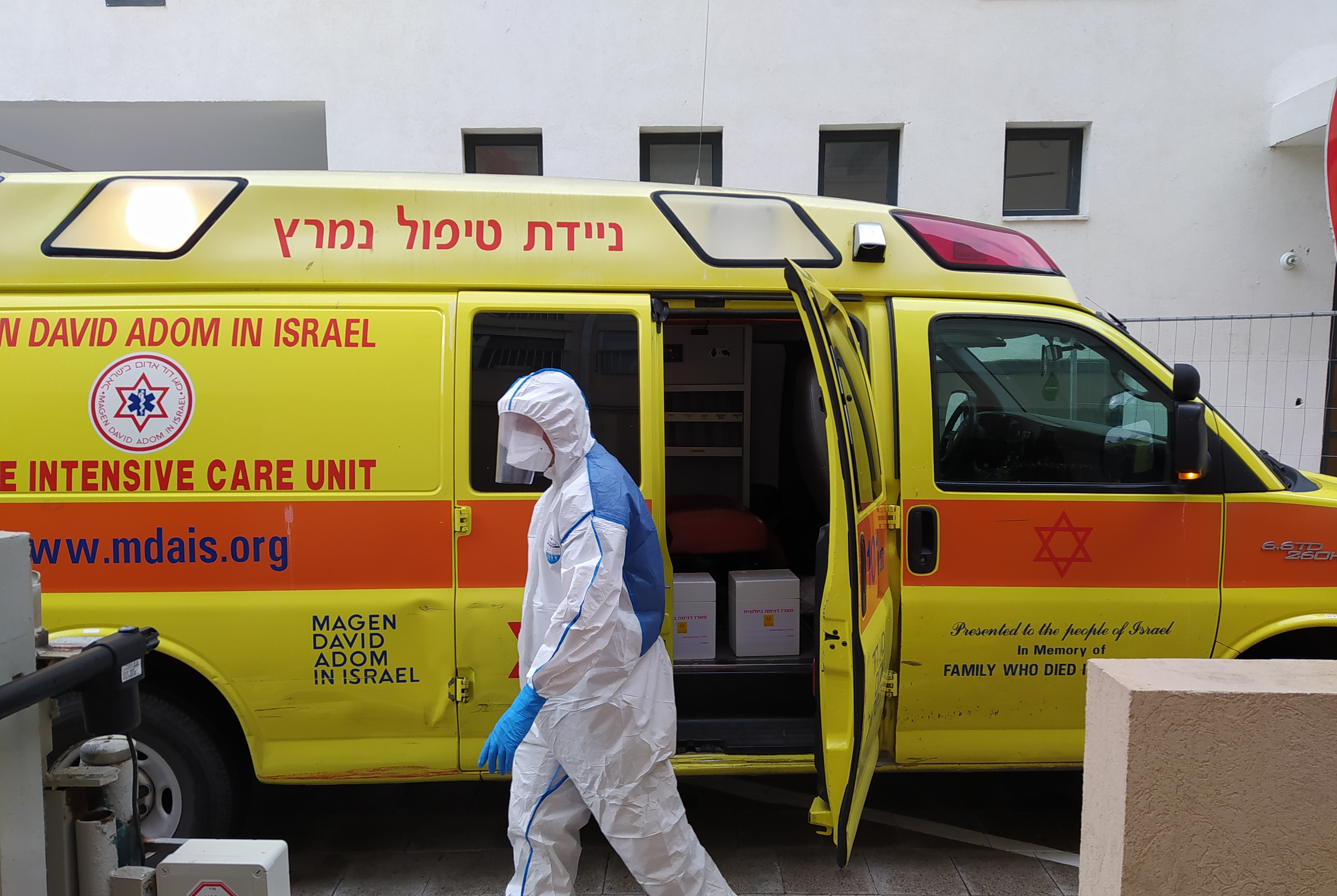 עובד ממוגן של מגן דוד אדום, רחוב אבן גבירול, תל אביב-יפו